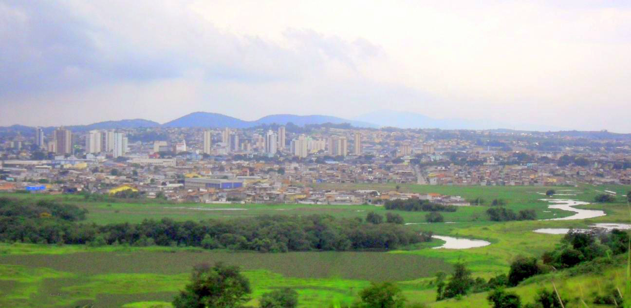 Suzano